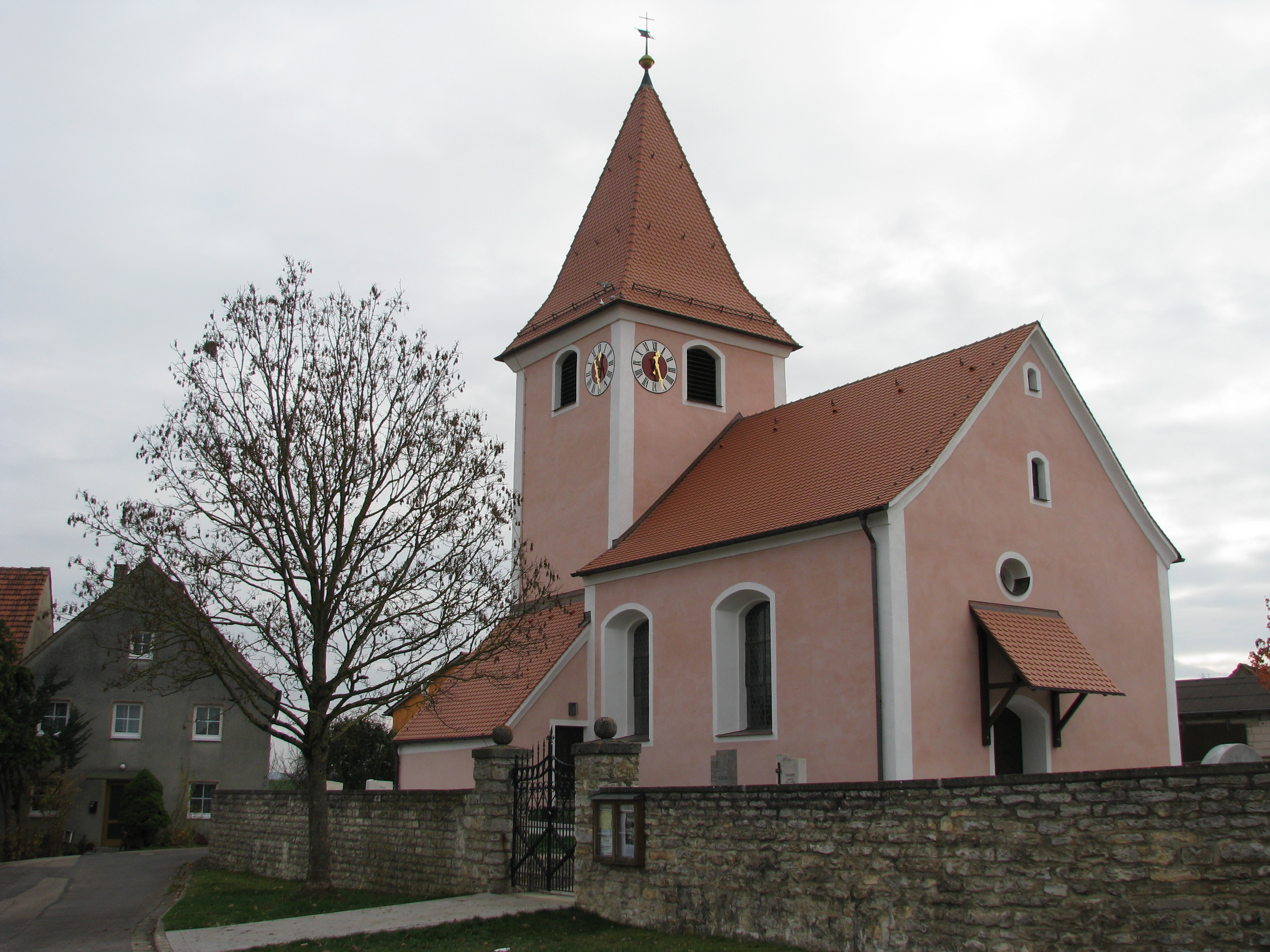 Oberndorf, Ortsteil der Stadt Freystadt im Landkreis Neumarkt in der Oberpfalz, Bayern, Evangelische Kirche St. Maria